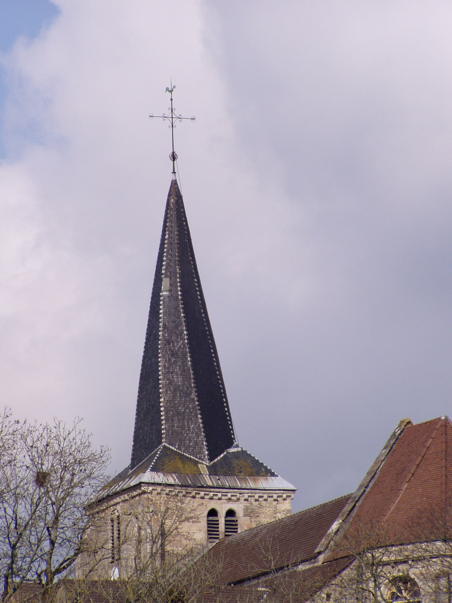 Clocher tors de l'église Saint-Germain de Vitteaux en Côte-d'Or, Bourgogne. France